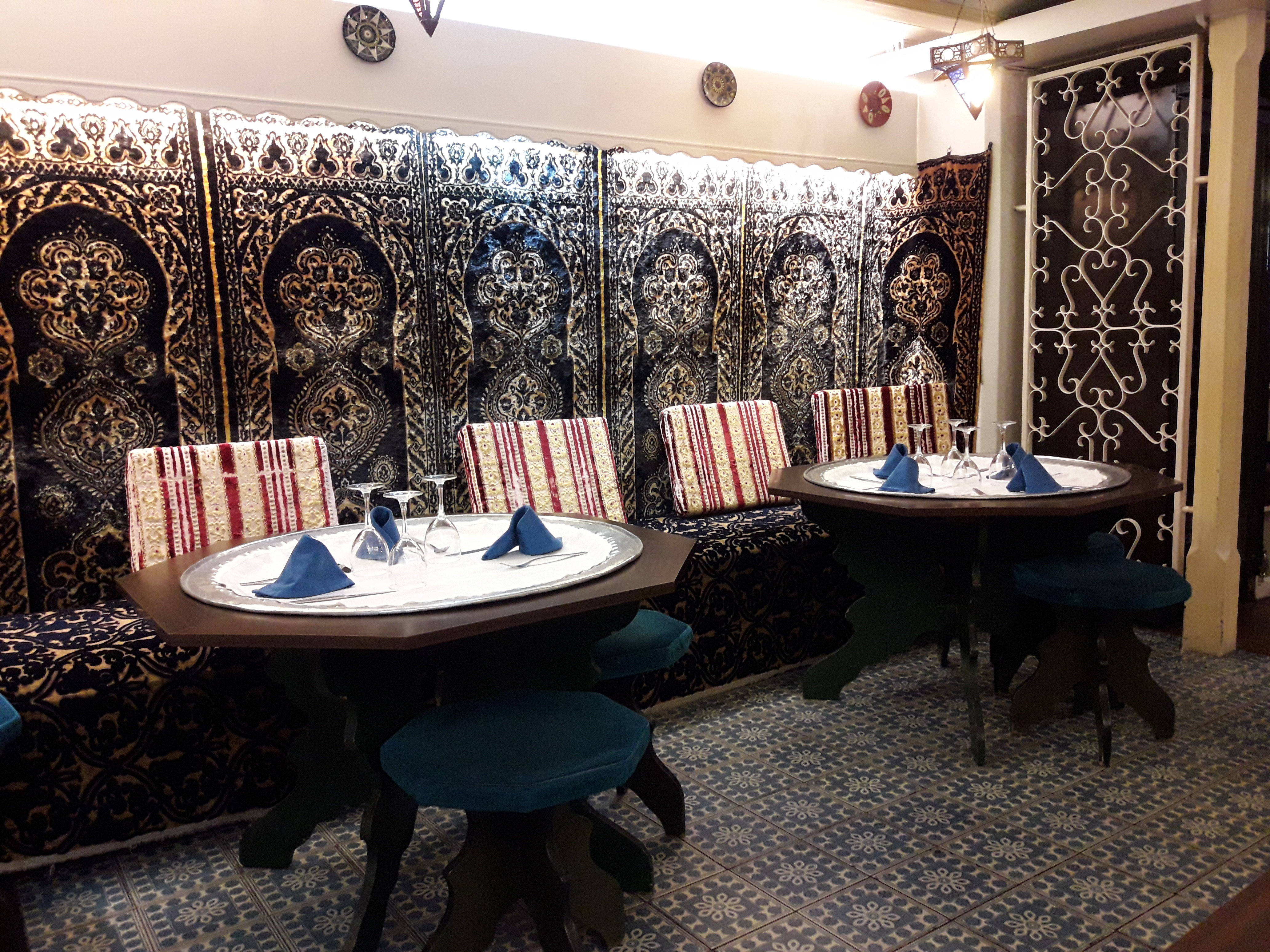 Interior del restaurant àrab "Kasbah"